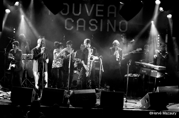 Abigoba et ses invités au Nouveau Casino, le 21 avril 2010 China Moses, Erik Truffaz, Marine Pellegrini, Patrick Bafon...